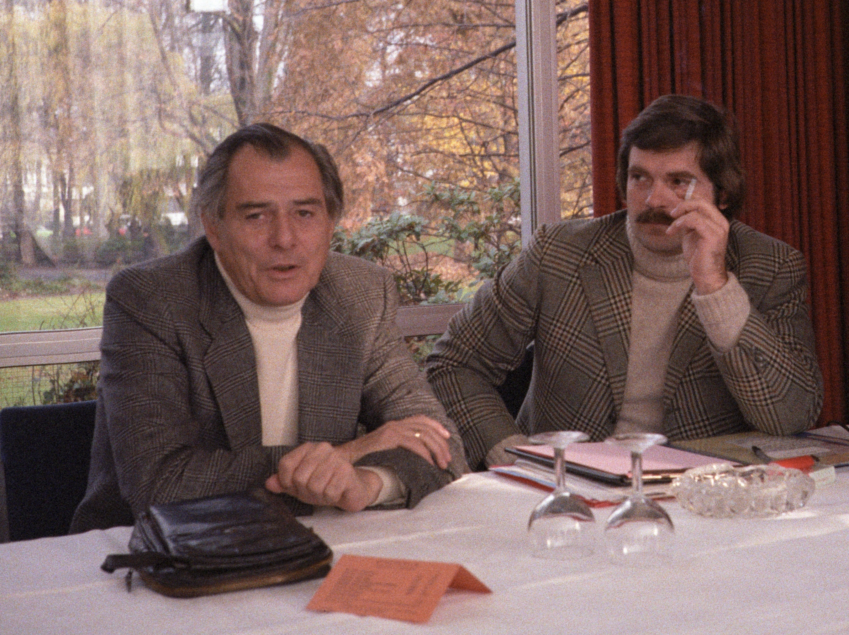 Sportreporter und Kabarettist Sammy Drechsel (links) mit Manfred Bloedorn, NDR